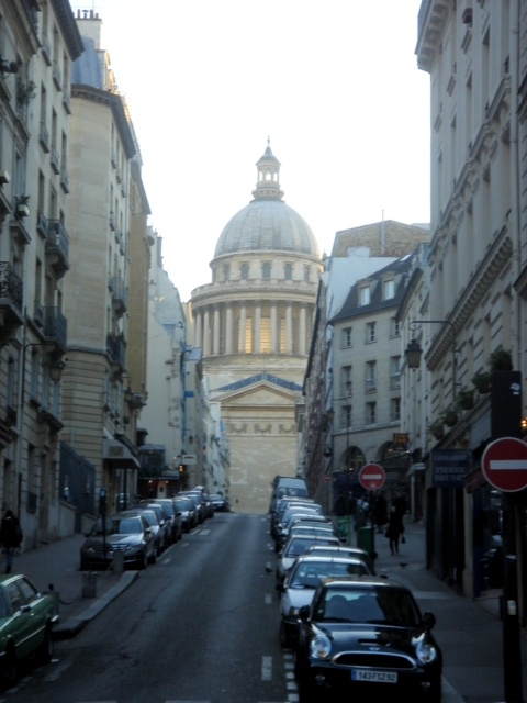 Panthéon à Paris en 2008.